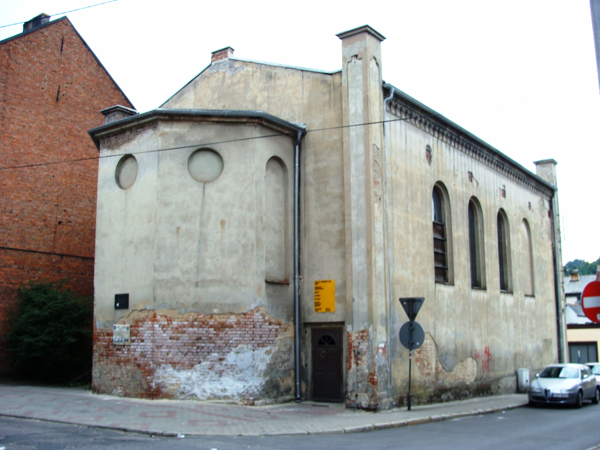 Koronowo, synagoga (od 1938 Towarzystwo Gimnastyczne "Sokół"), 1858